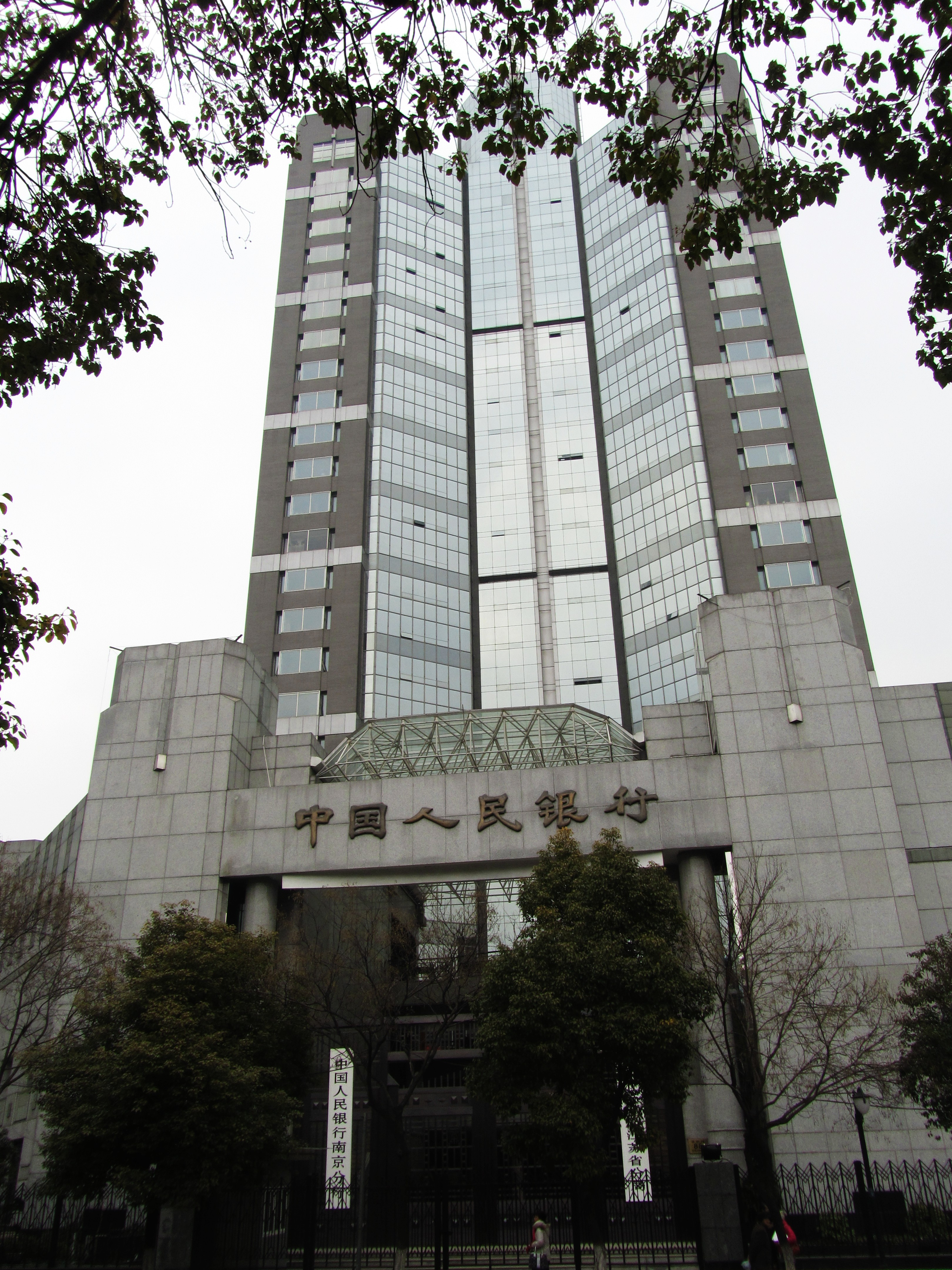 中国人民银行南京分行大楼，位于南京市秦淮区建邺路88号。